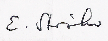 Elisabeth Ströker. Signatur ihres Briefes an mich vom 17.12.1976.